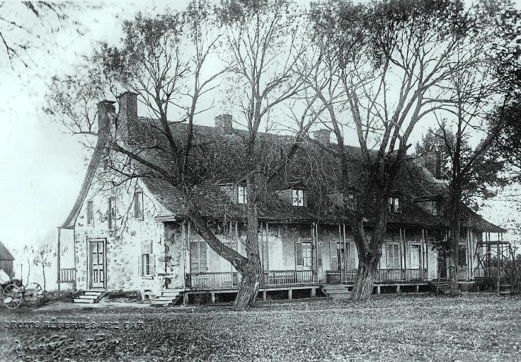 Photographie, Maison de Georges-Étienne Cartier, Saint-Antoine-sur-Richelieu, QC, 1912 - Gélatine argentique